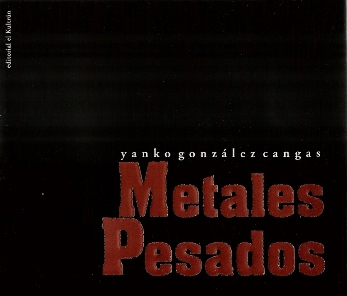 Imagen de Metales pesados, obra del poeta chileno Yanko González